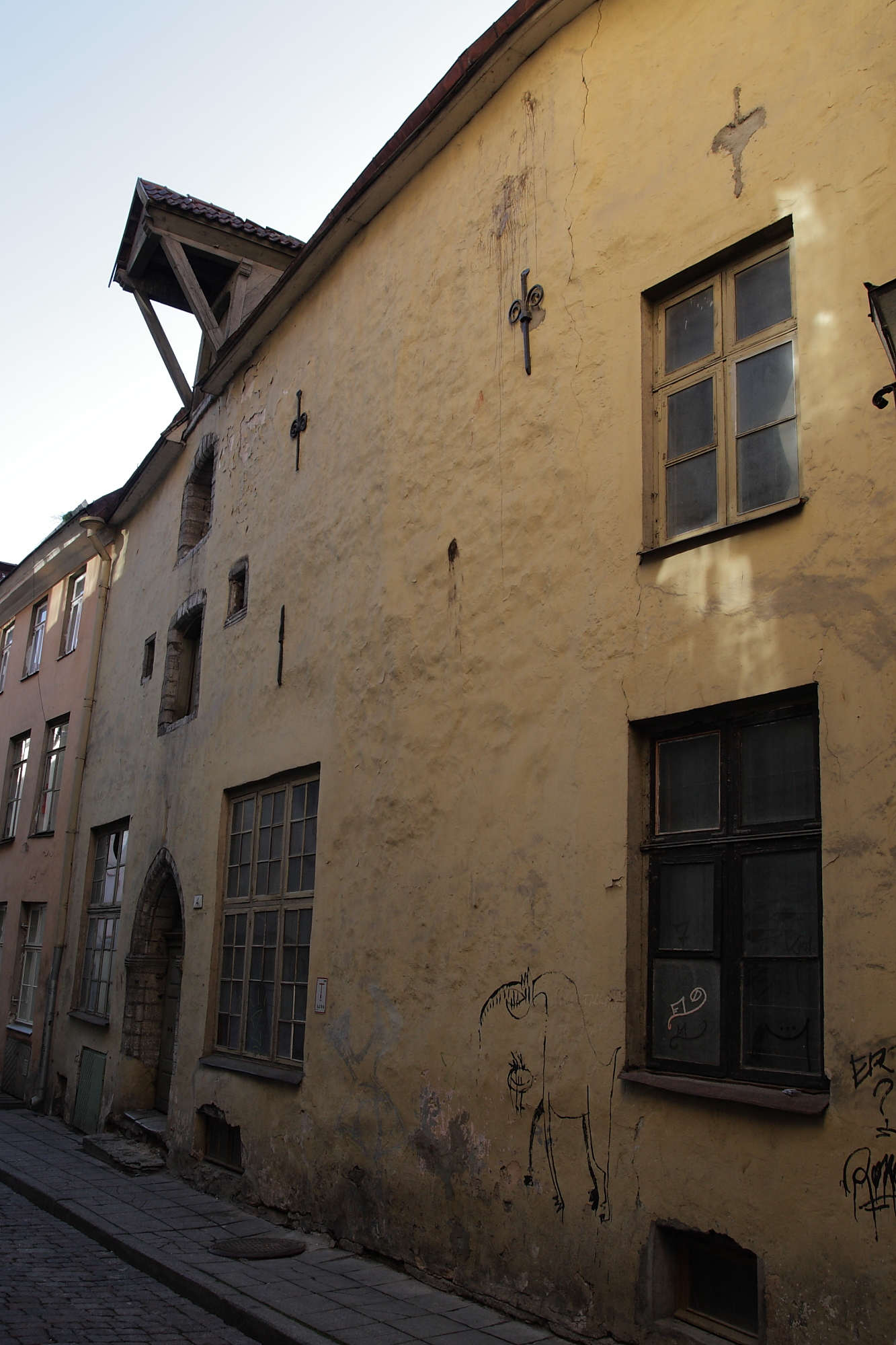 Tallinn, elamu-ait Sauna 4, 15.-18.saj